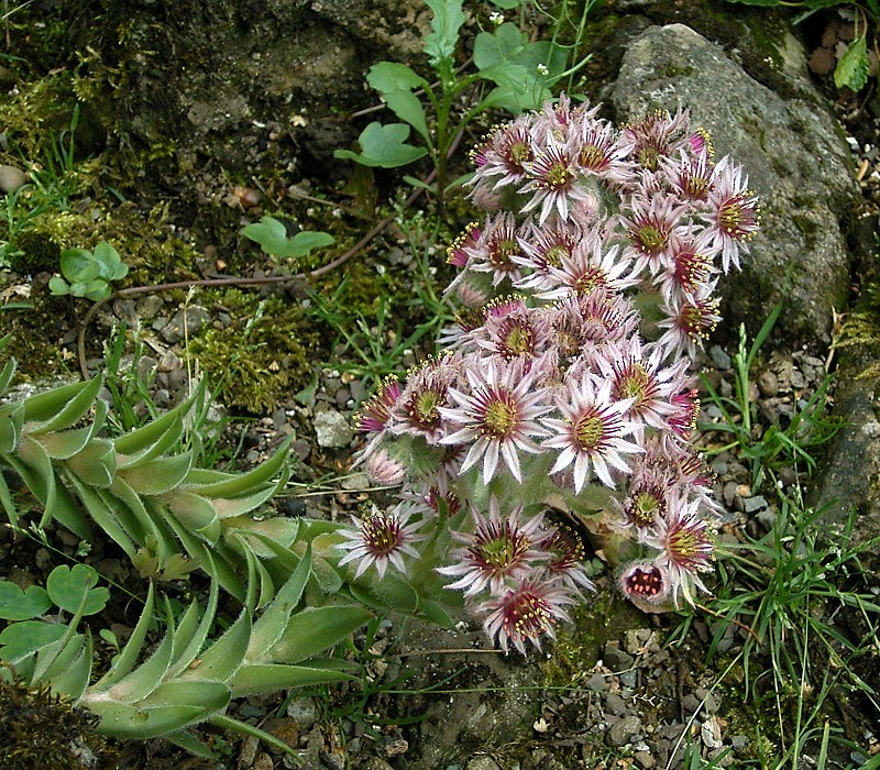 Sempervivum arvernense